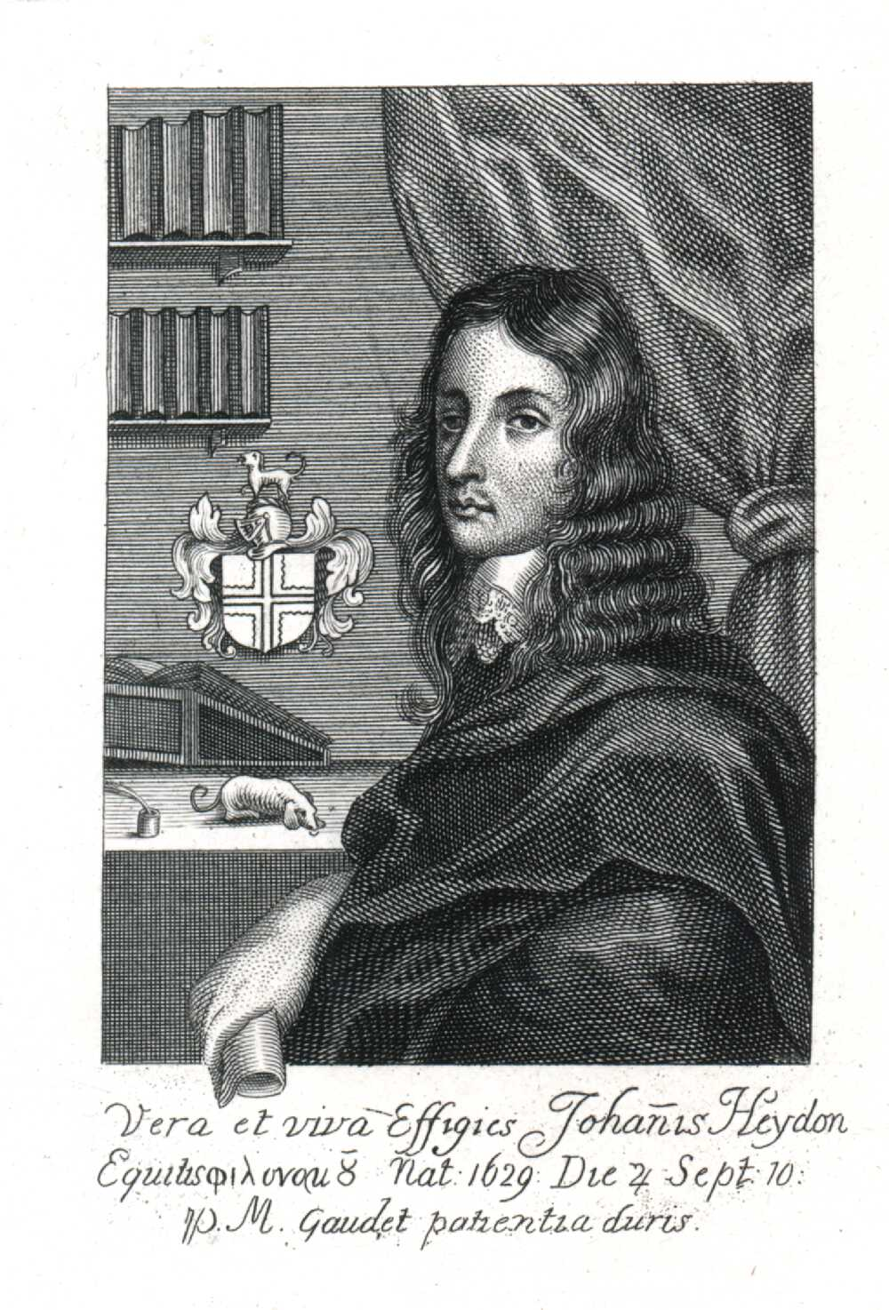 Der englische Astrologe und Rosenkreuzer Sir John Heydon (1629-~1670)